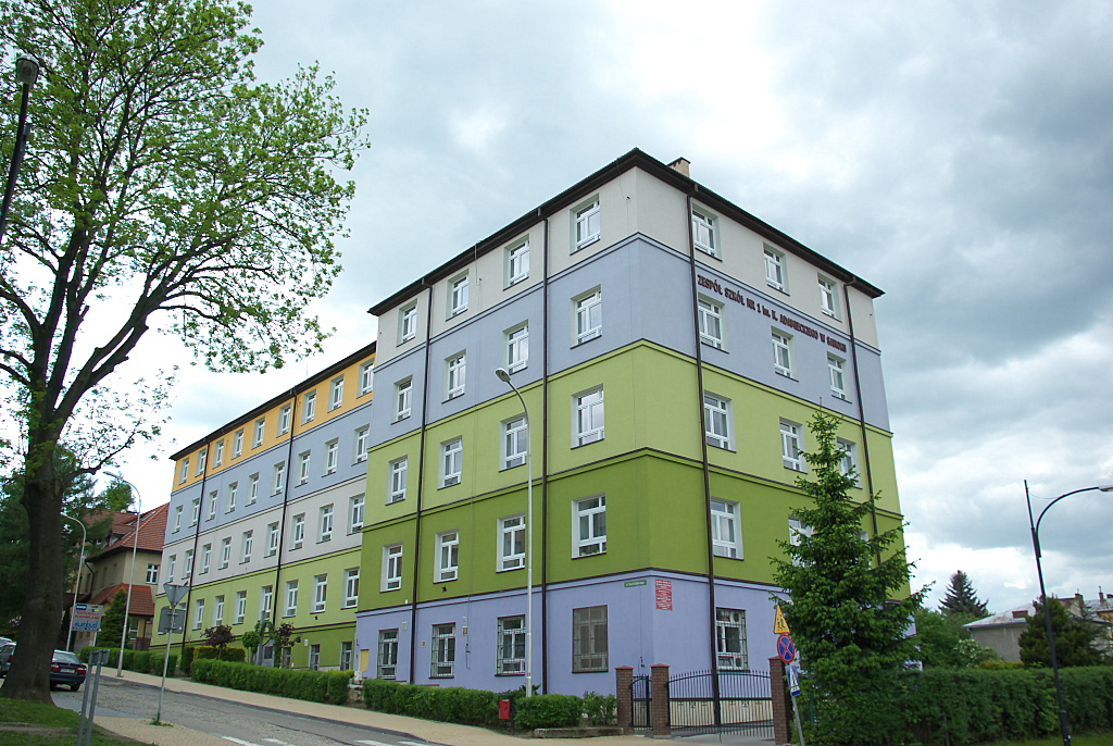 ZS nr 1 Ekonomik Sanok